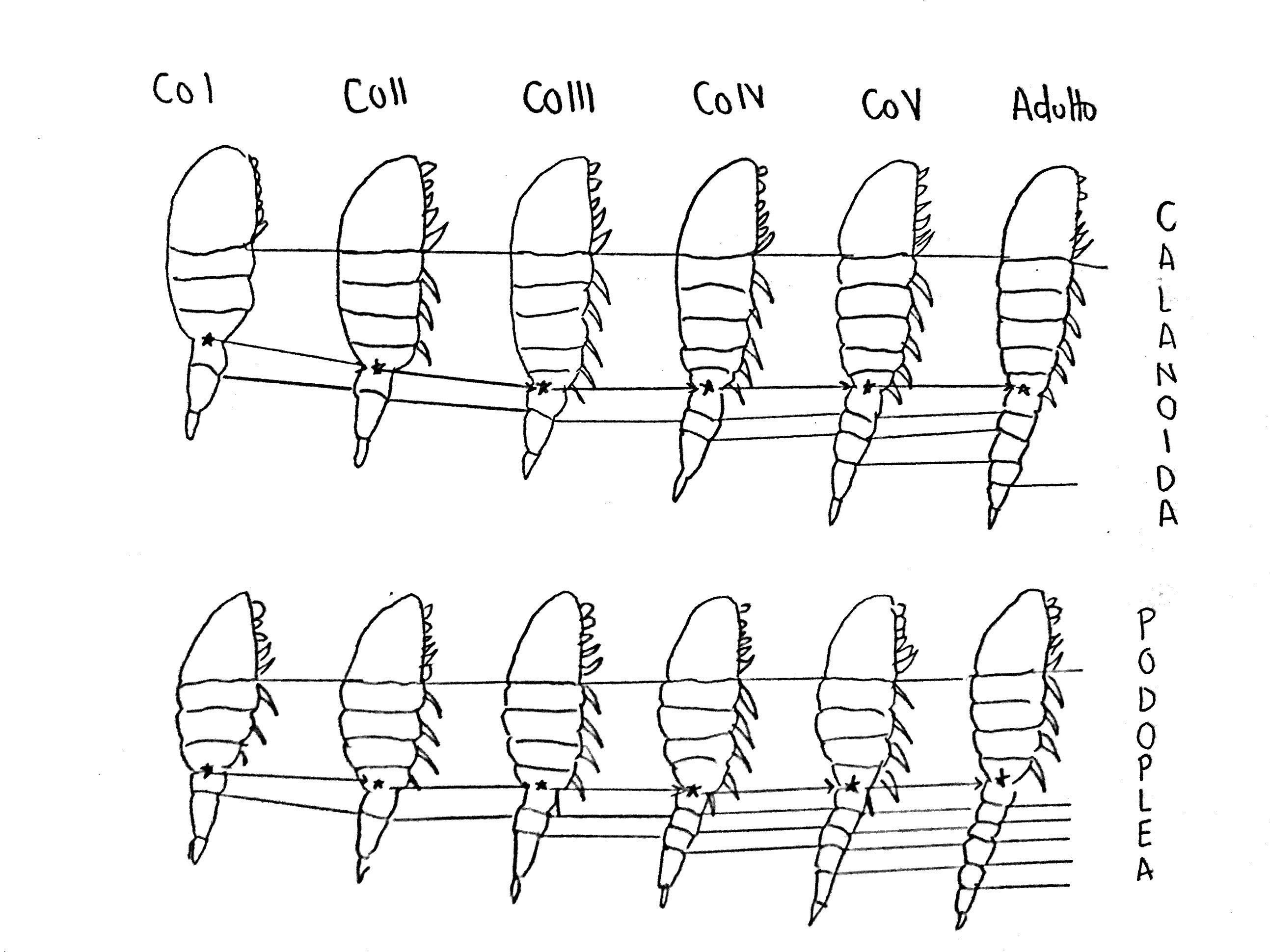 desarrollo en copepoditos comparacion